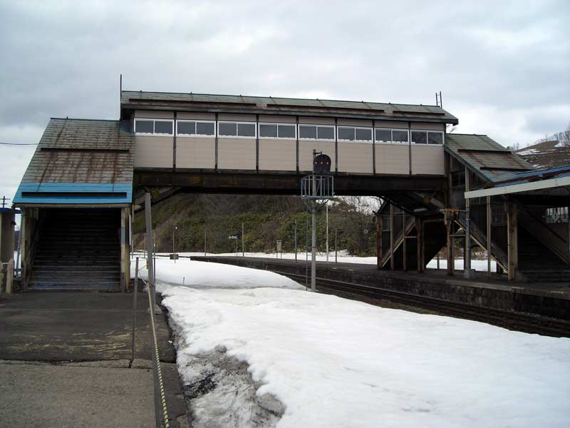 小沢駅跨線橋、画像は小樽・札幌方面（2007年4月撮影）